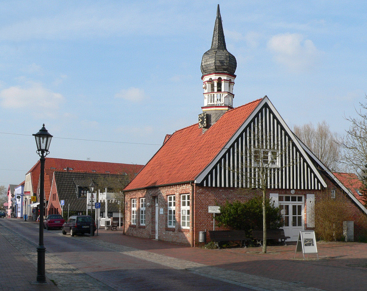 Straße in Hooksiel mit Zwiebelturm